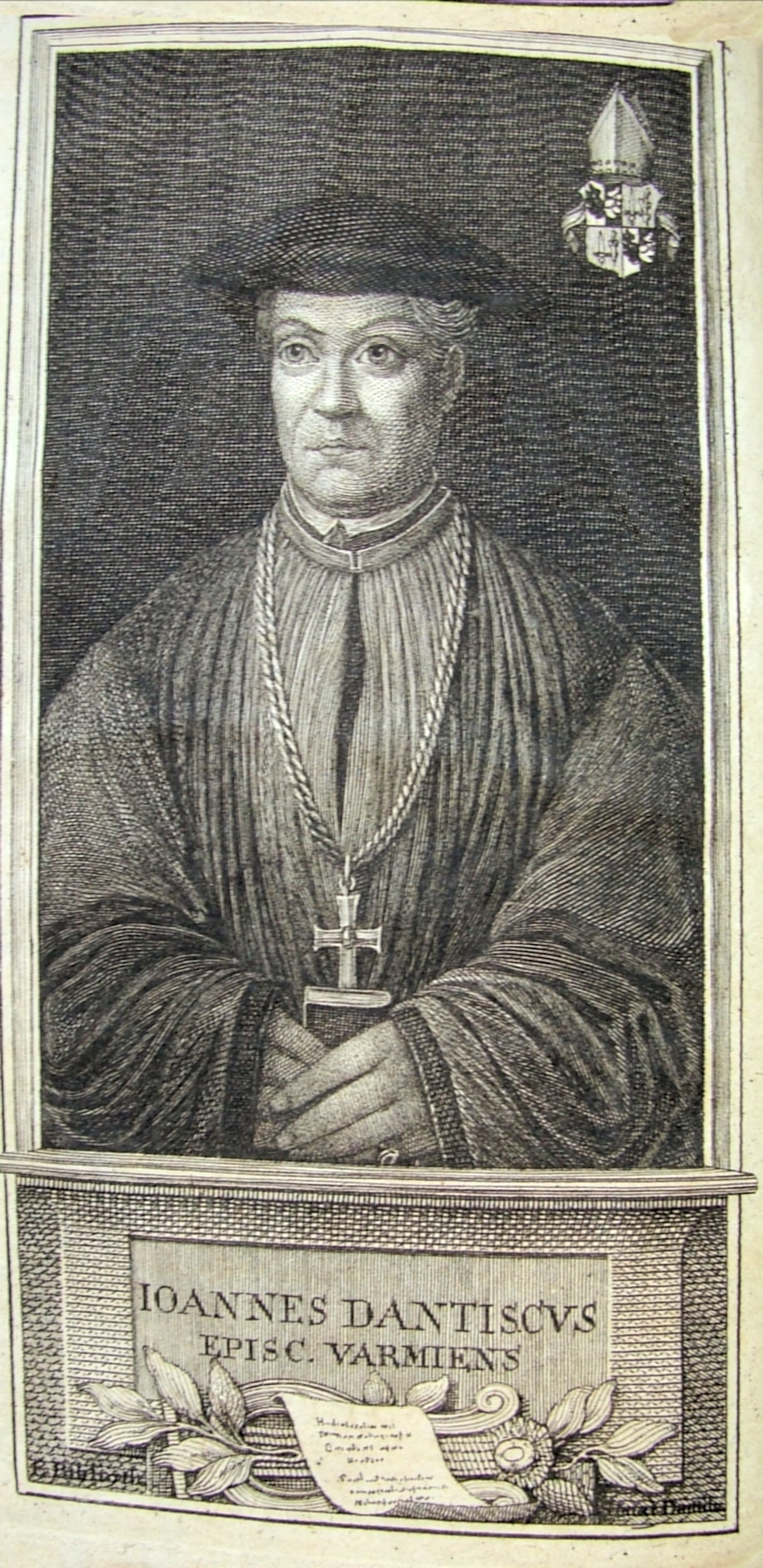 Portret biskupa Jana Dantyszka z jego książki